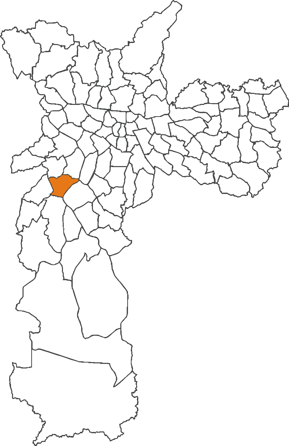 Localização do distrito de Vila Andrade no município de São Paulo.